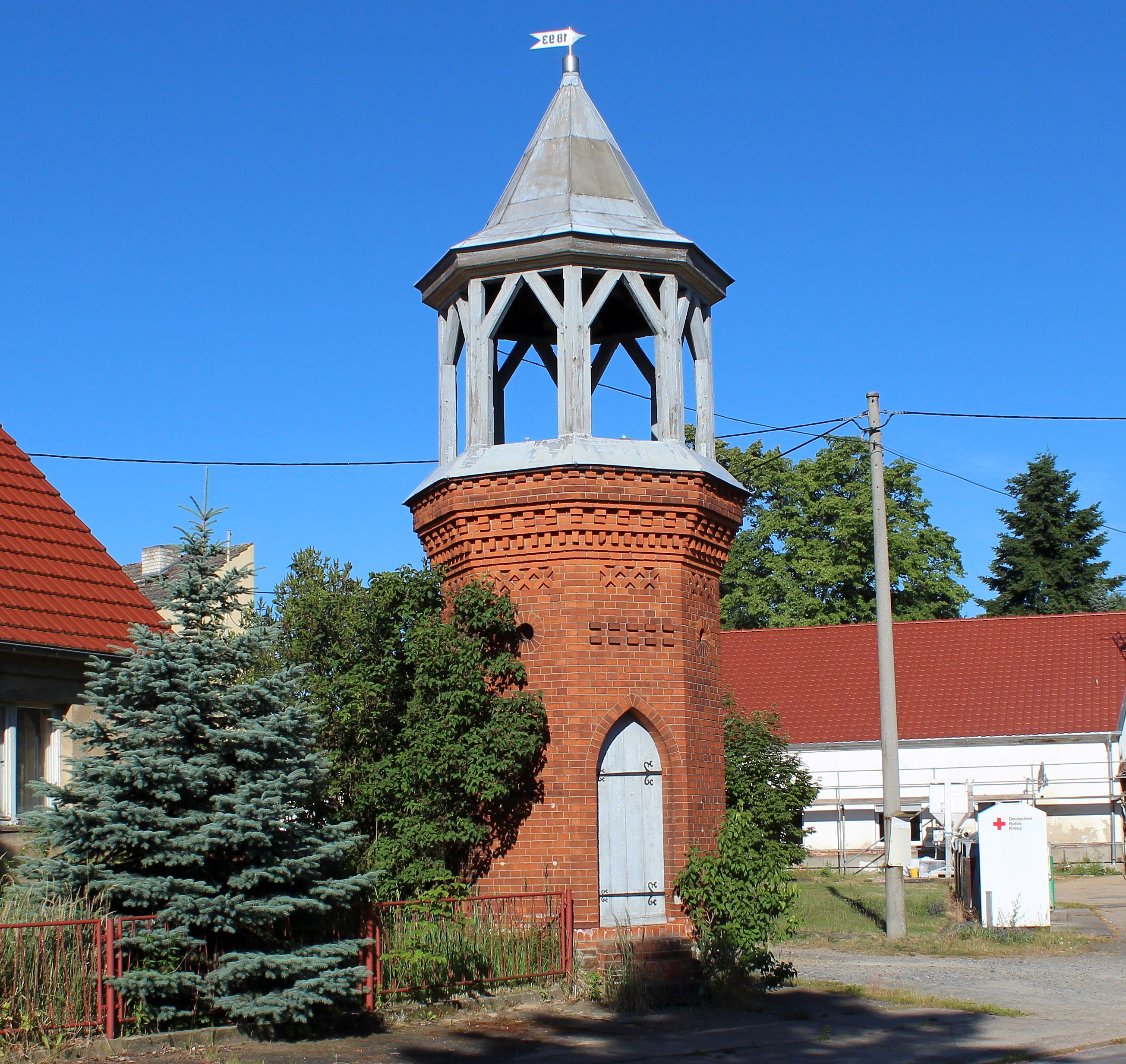 Der Glockenturm in Kraupa.